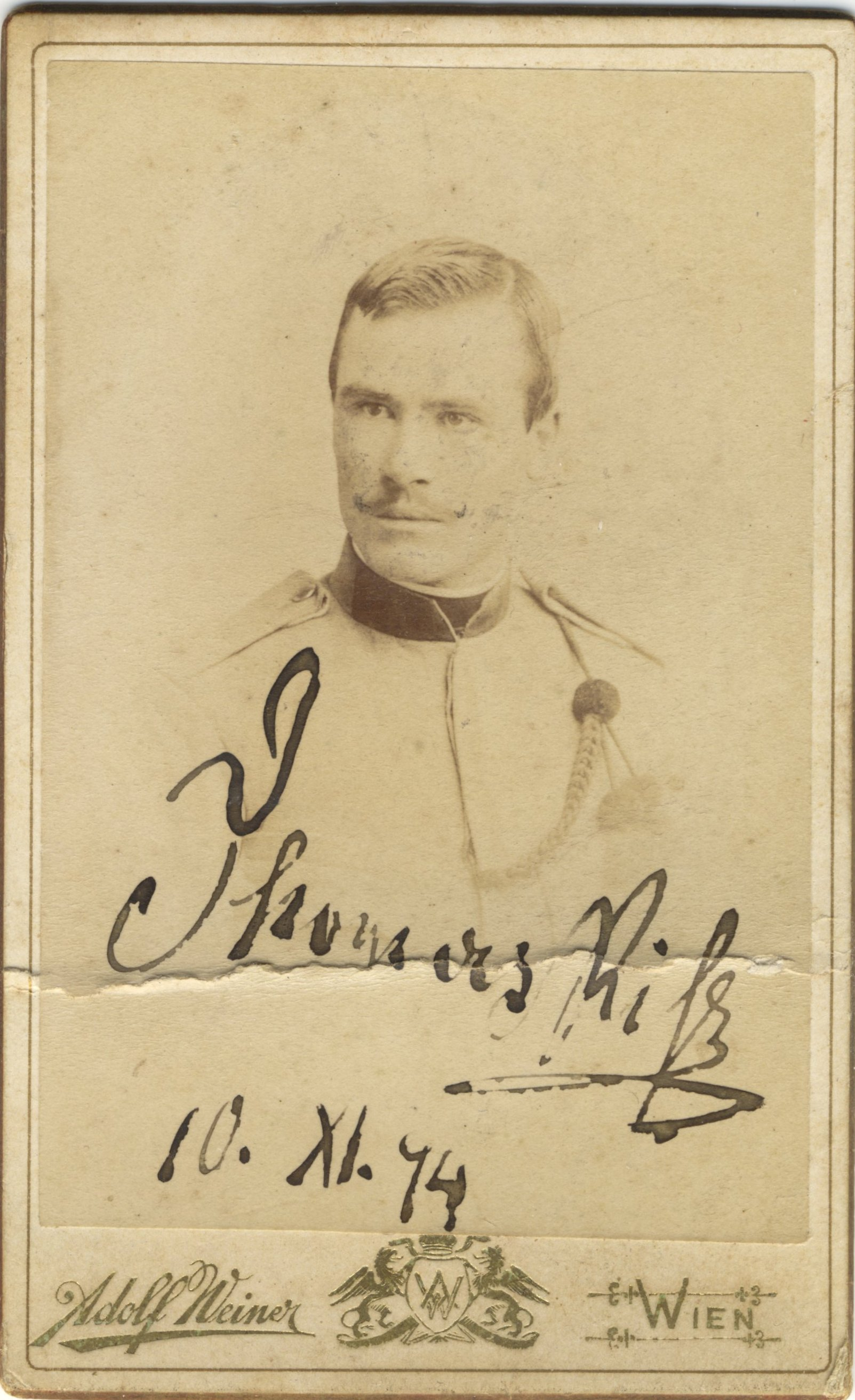 Thomas Riss beim Militär 1894